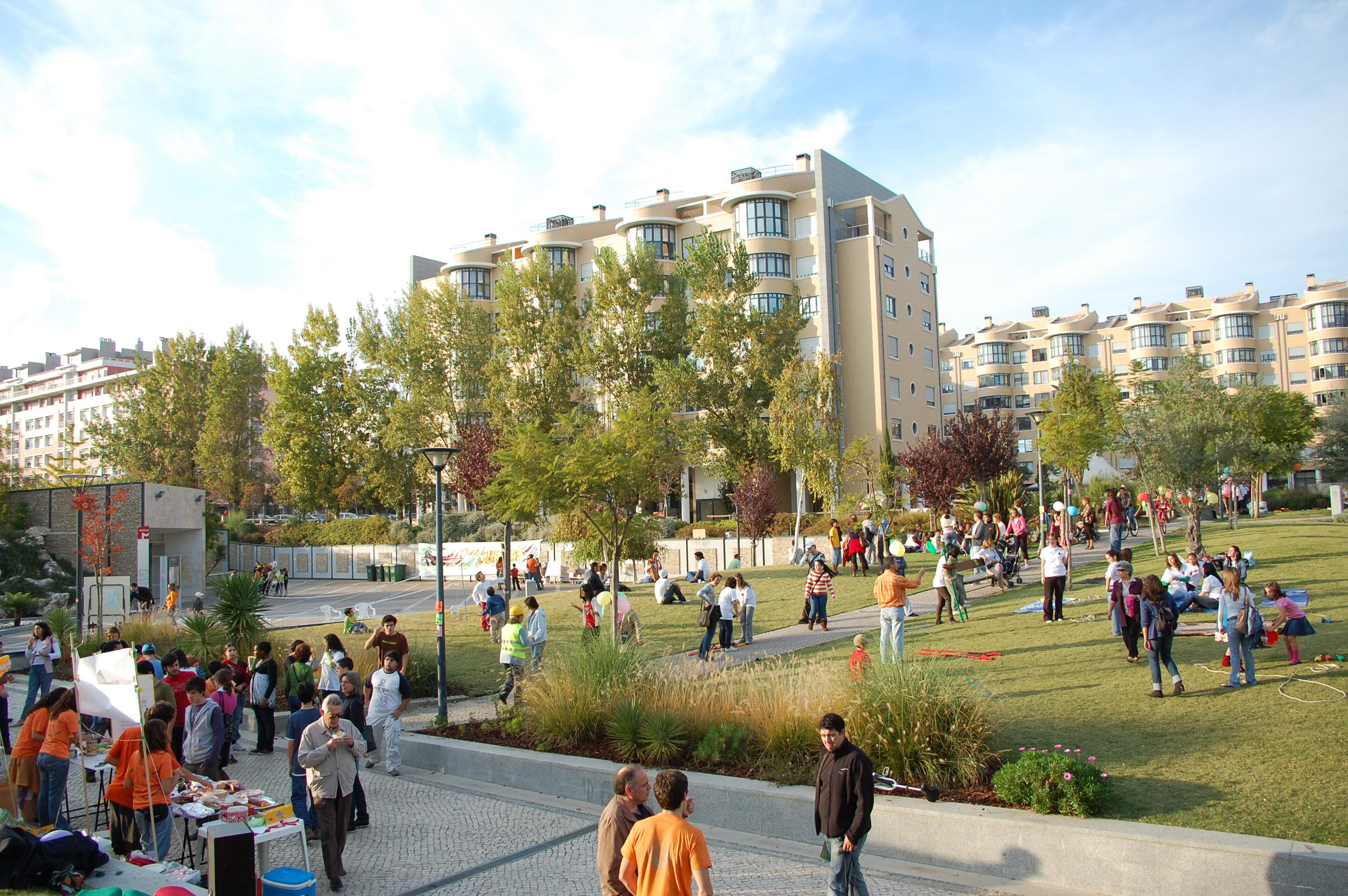 Primeiro Festival de Telheiras organizado pela ARTJovem (Jovens da Associação de Residentes de Telheiras)